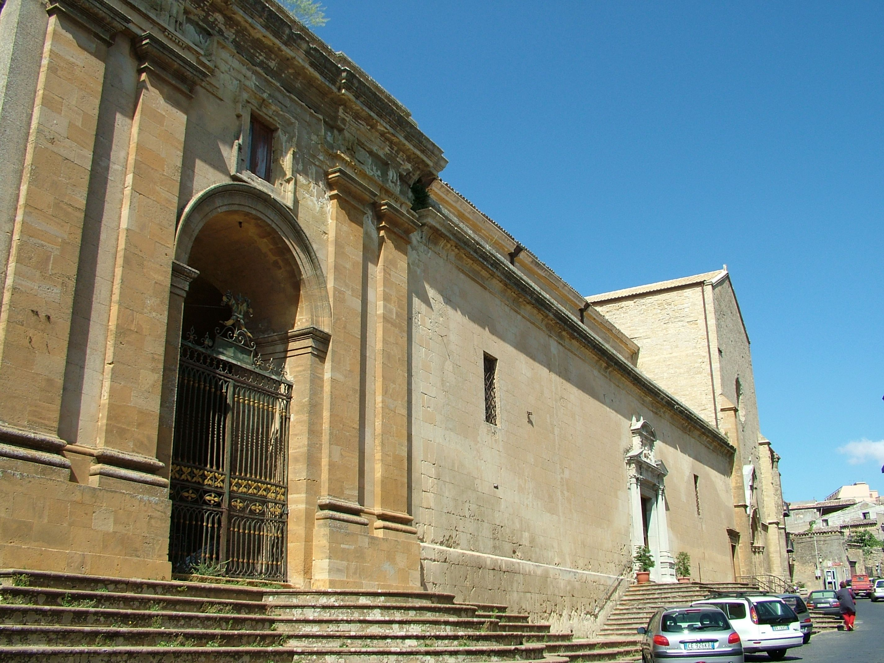 Enna, Sizilien, Dom die Steinwände zur Via Roma